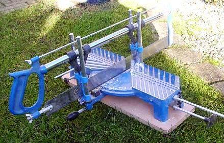 verstekzaag